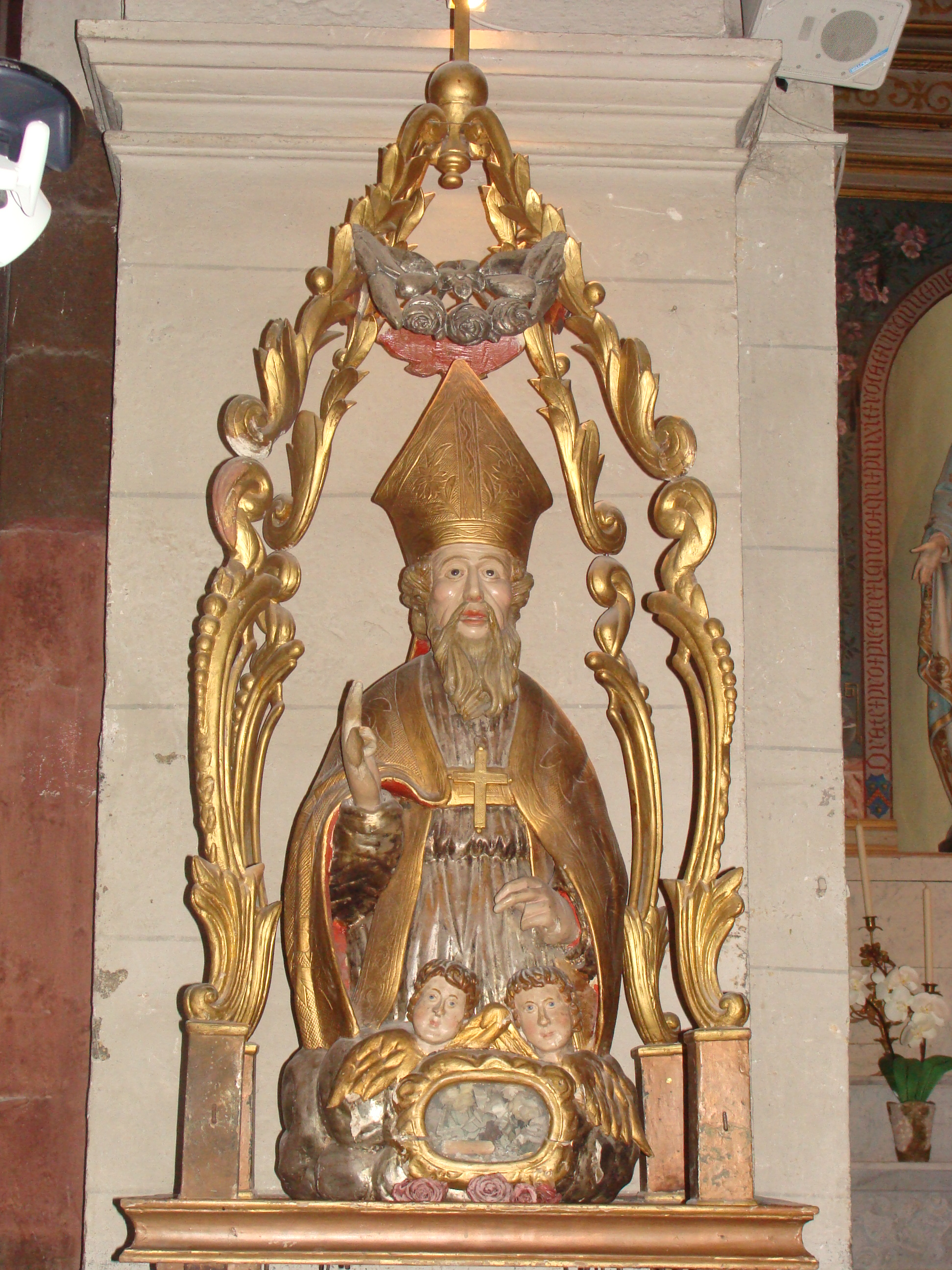 Statue de Saint Grégoire, en bois doré, dans l'église de Tallard (Hautes-Alpes).